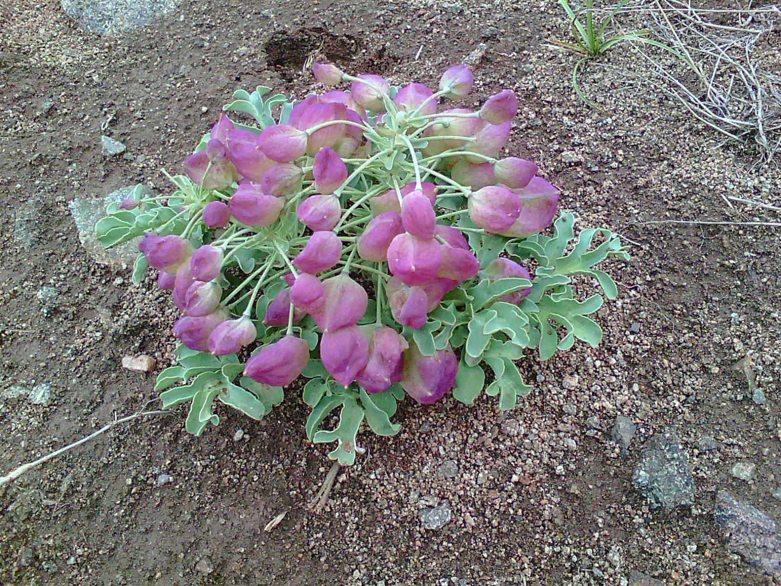 گل‌های وحشی الوند. گونه بسیار نایاب و در شرف انقراض نیازمند توجه و مراقبت